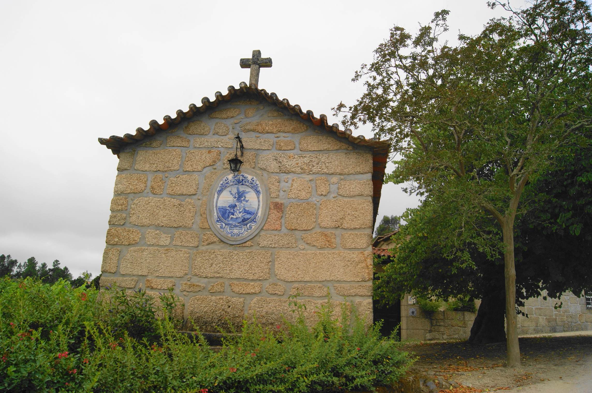 Amarante Fregim Capela de São Miguel